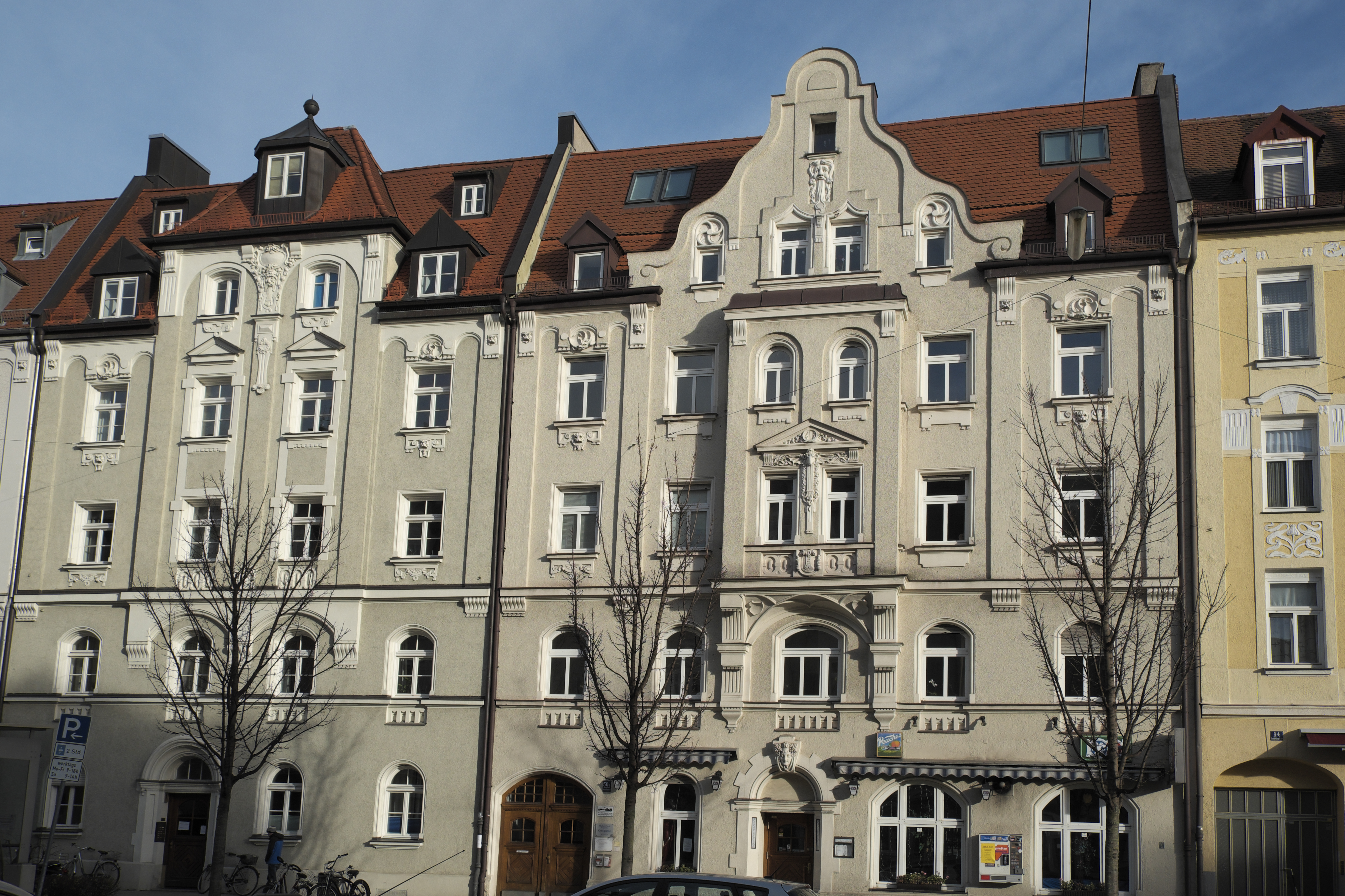 Mietshaus in der Donnersbergerstraße 50 und 50a in Neuhausen im Stadtbezirk Neuhausen-Nymphenburg in München (Bayern/Deutschland), um 1900